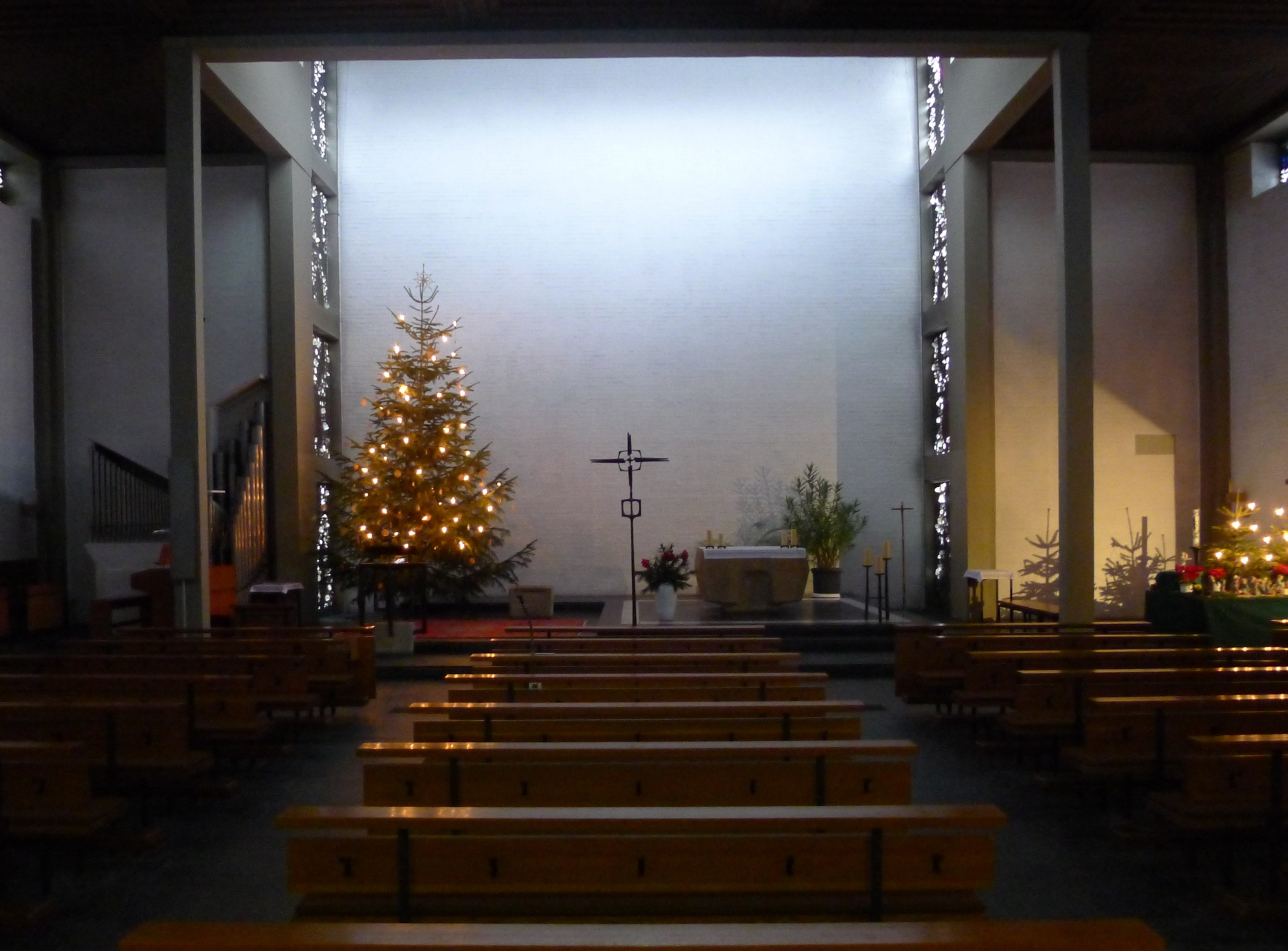 Blick in den Kirchraum